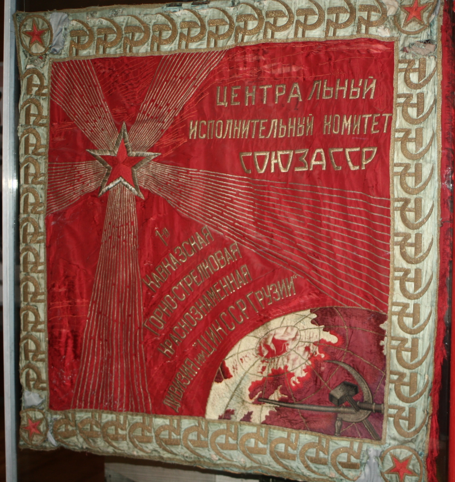 Боевое_Знамя__1-й_Кавказской_гсд..из музея 9-й мсд